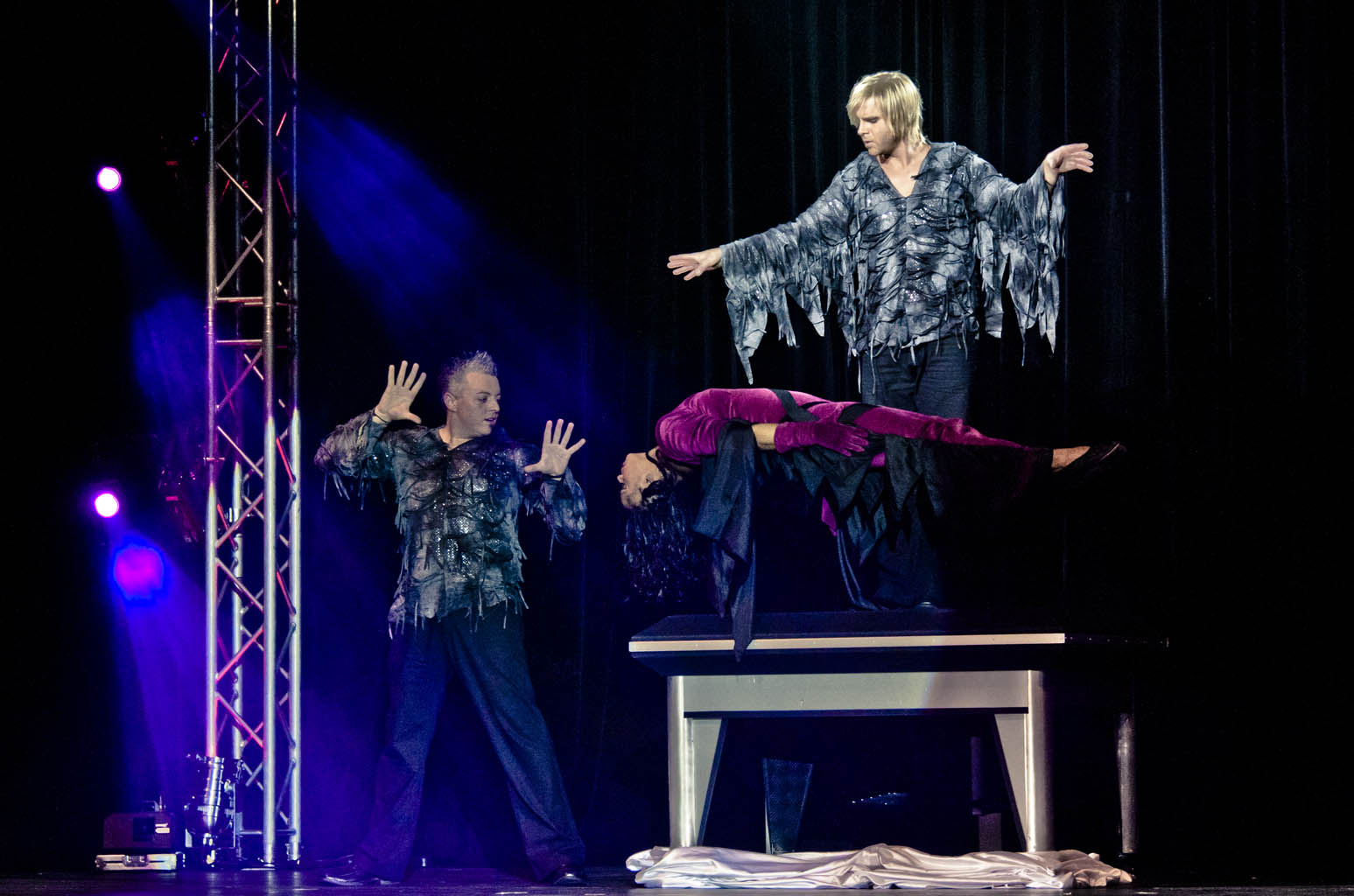 Marc & Alex Levitation Balingen 2010